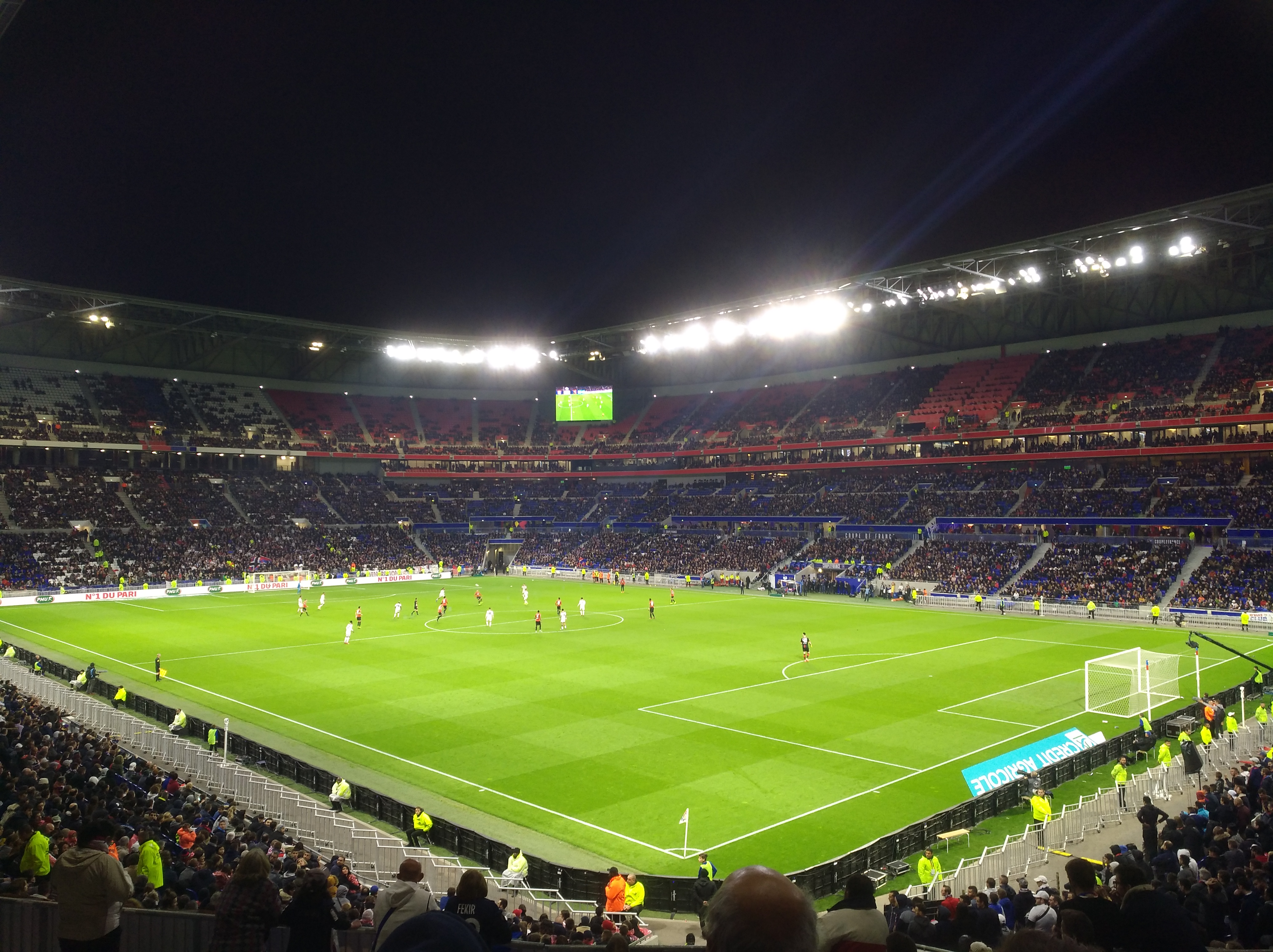 Vue du Groupama Stadium lors de la demi-finale de Coupe de France entre l'Olympique lyonnais et le Stade rennais (victoire 3-2 de Rennes).